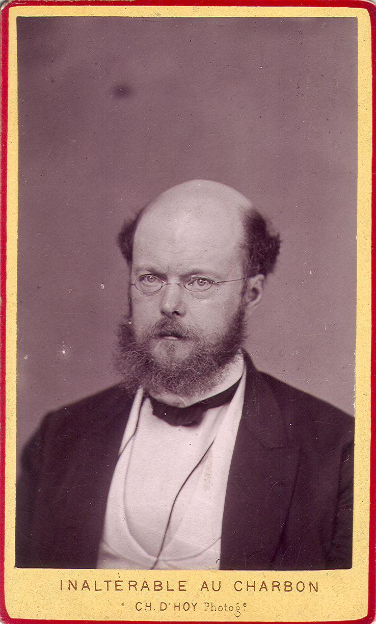 Portret van Ferdinand vander Haeghen (1830-1913), bibliograaf, hoofdbibliothecaris van de universiteit van Gent en stichter van de Bibliotheca Belgica